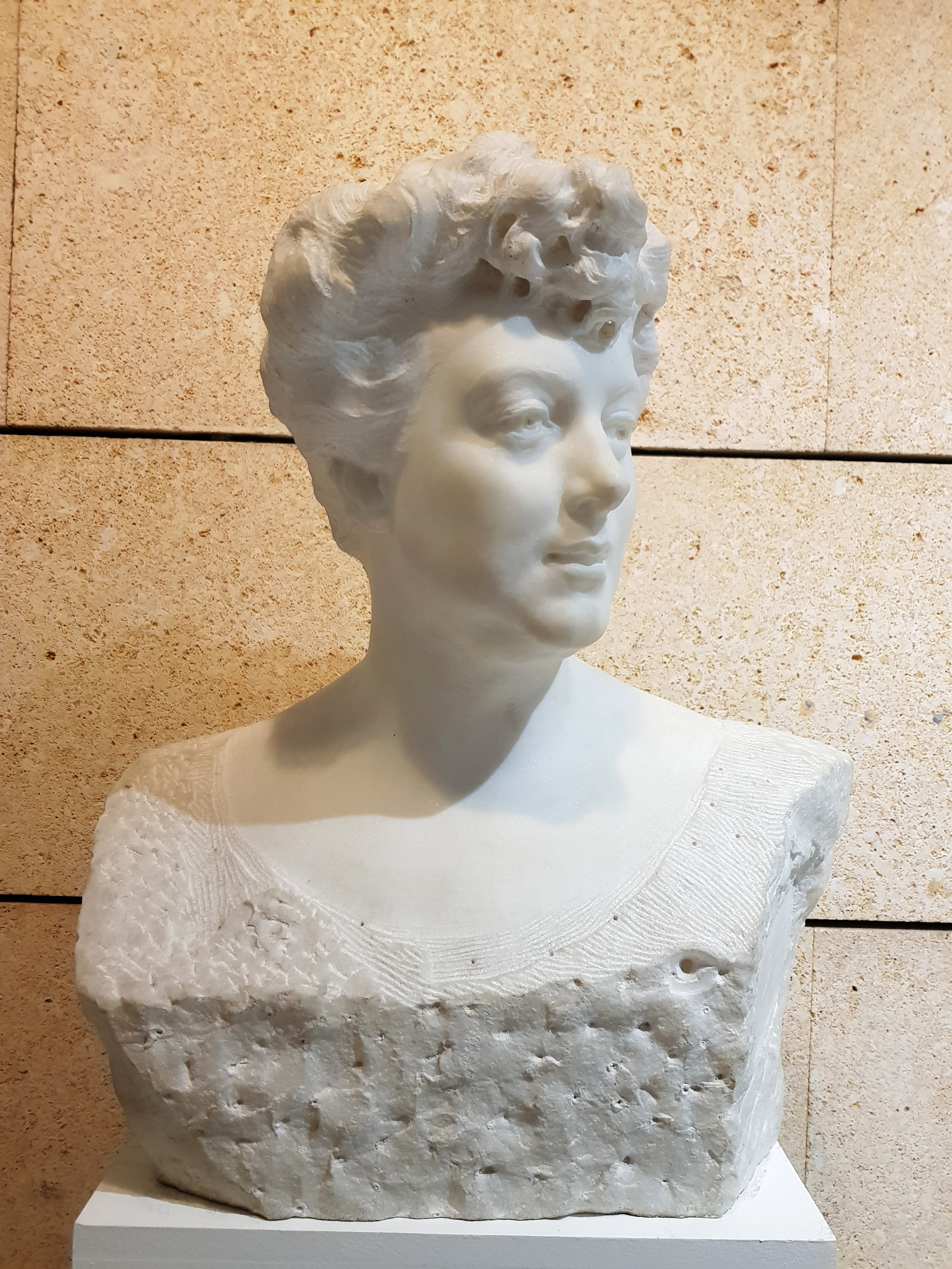 Marmorbüste des von Concepción Gimeno, Ehefrau des mehrfachen spanischen Ministers, Amalio Gimeno y Cabañas.